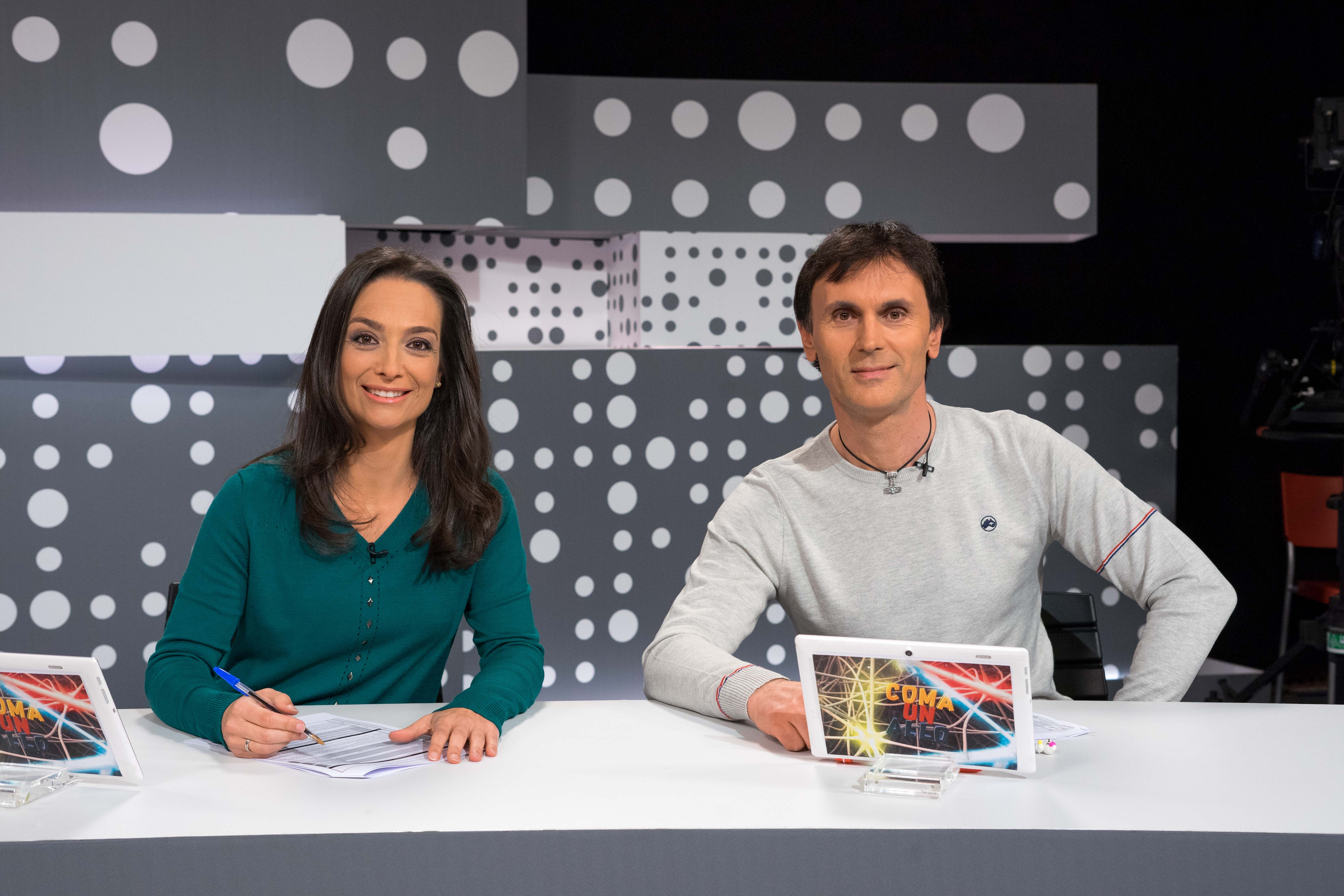 María Canosa Blanco e Jorge Mira Pérez sentados na mesa do plató do programa Coma un allo da TVG